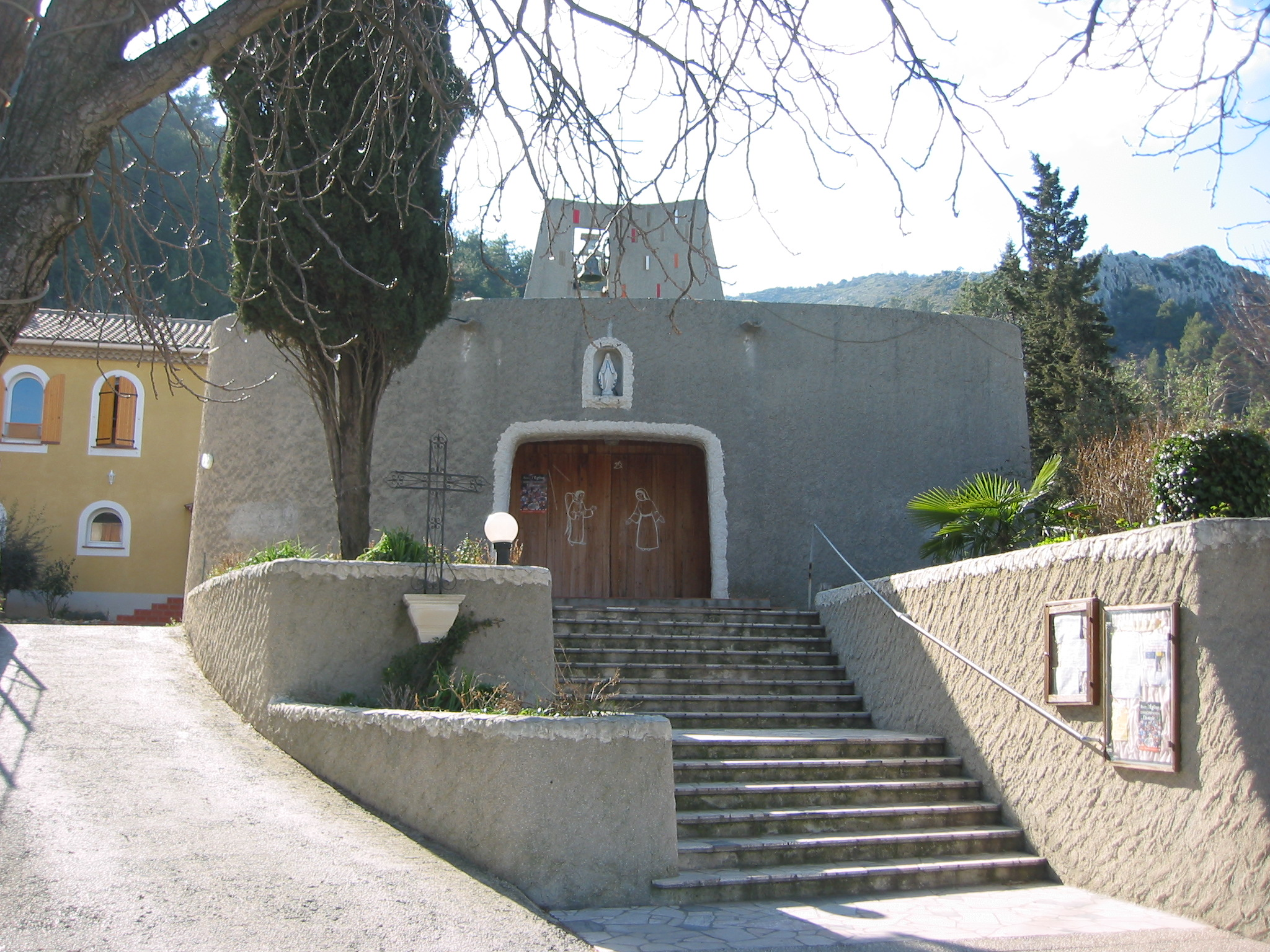 Église de Saint-Savournin, Bouches-du-Rhône, France. Photo prise le 1 mars 2006. Auteur : Ludovic Ruat (utilisateur:civodule)